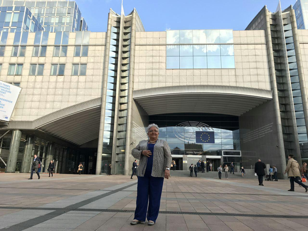 Imelda Daza, integrante de Voces de Paz y Reconciliación